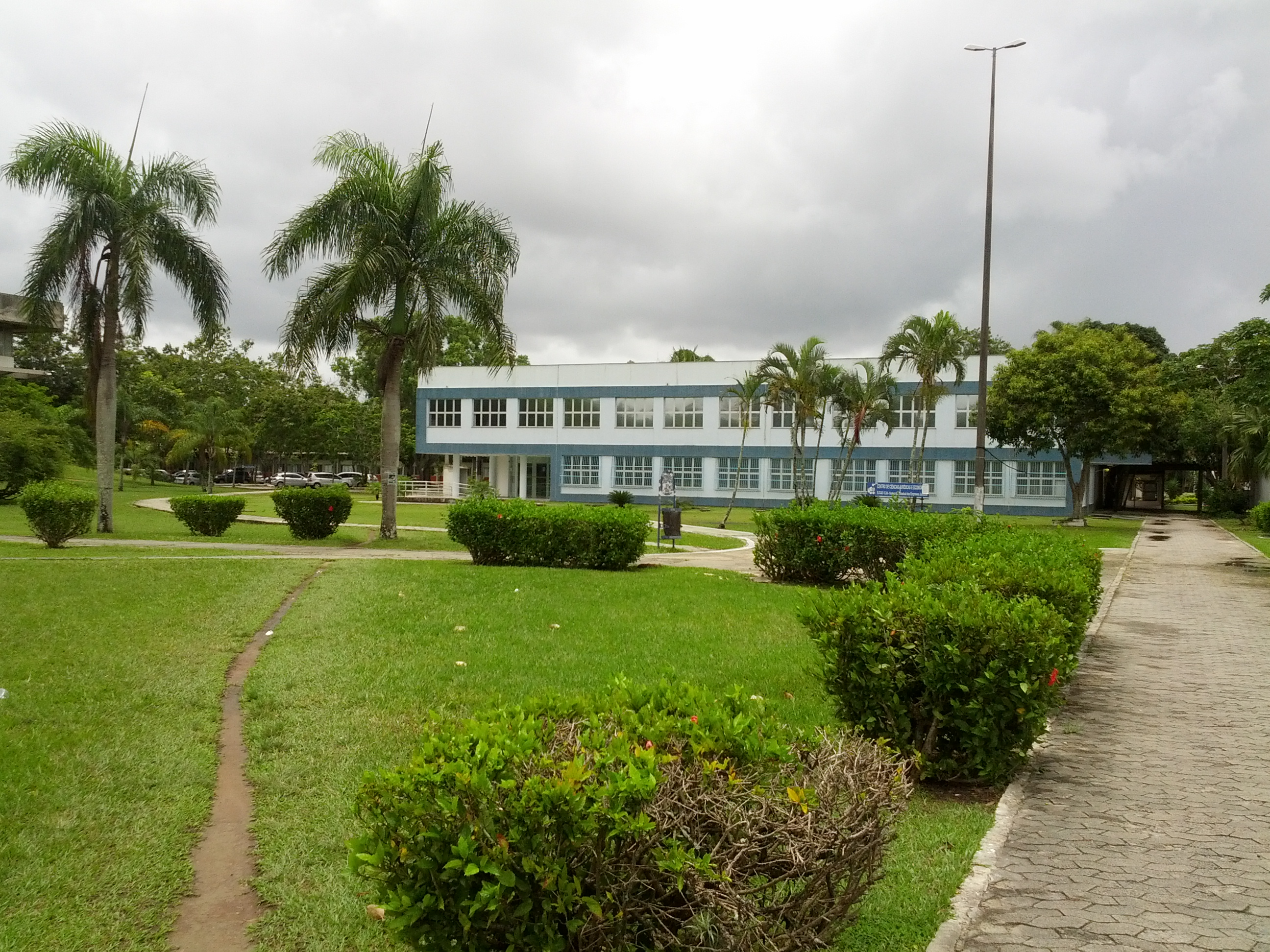 Imagem do prédio da Pós Graduação em Física (PPGFIS), localizado na Universidade Federal do Espírito Santo, Campus Goiabeiras.